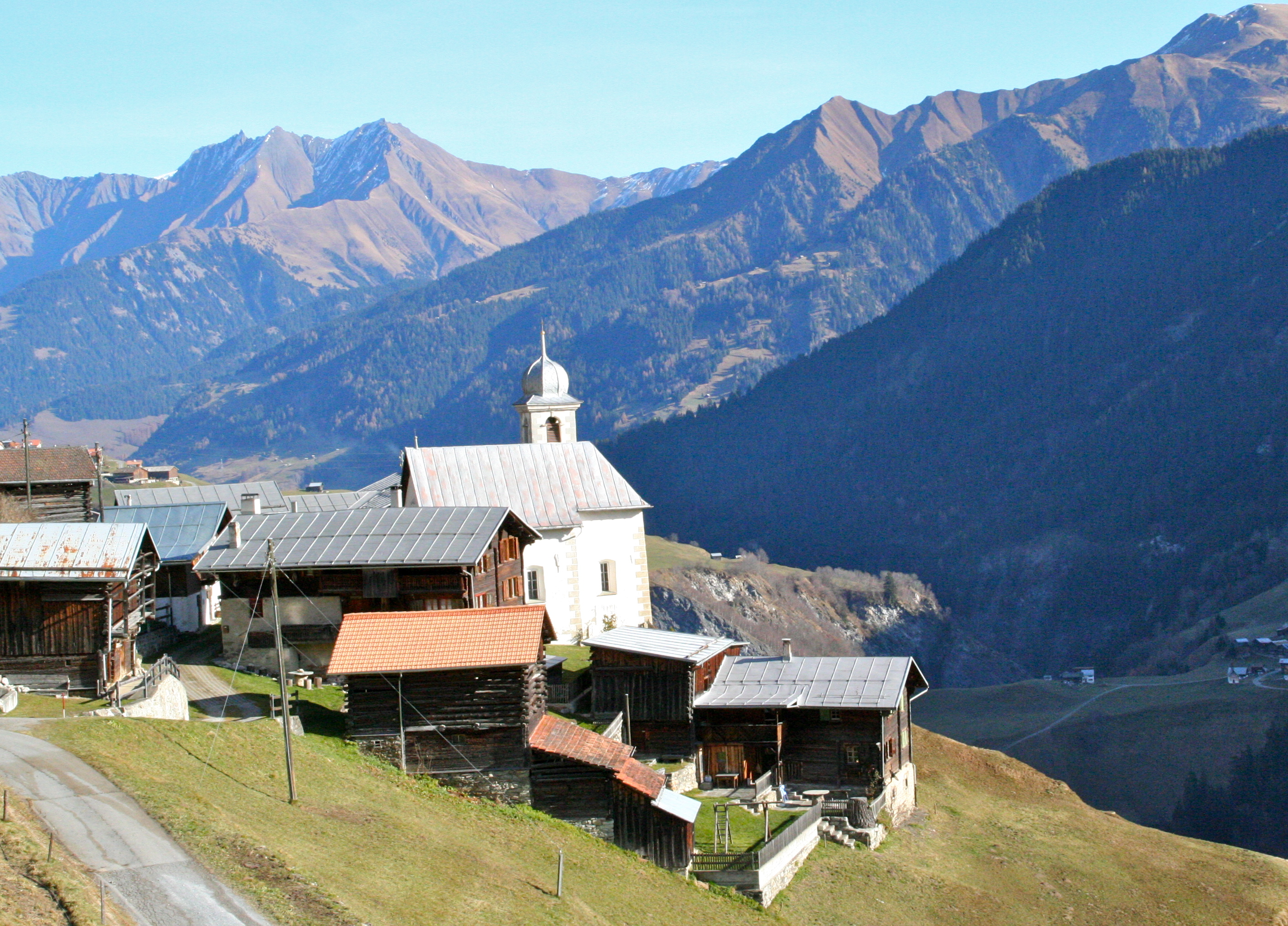 Kapelle St. Andreas (Lumbrein) Ansicht von Westen